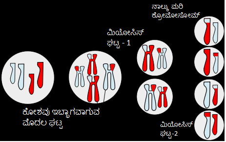 ಕನ್ನಡ: ಮಿಯಾಸಿಸ್ ಪ್ರಕ್ರಿಯೆಯಿಂದ ಒಂದು ಜೀವಕೋಶ ಹೇಗೆ ವಿಭಜನೆಗೊಳ್ಳುತ್ತದೆ ಎಂಬುದನ್ನು ಚಿತ್ರ ತೋರಿಸುತ್ತದೆ.